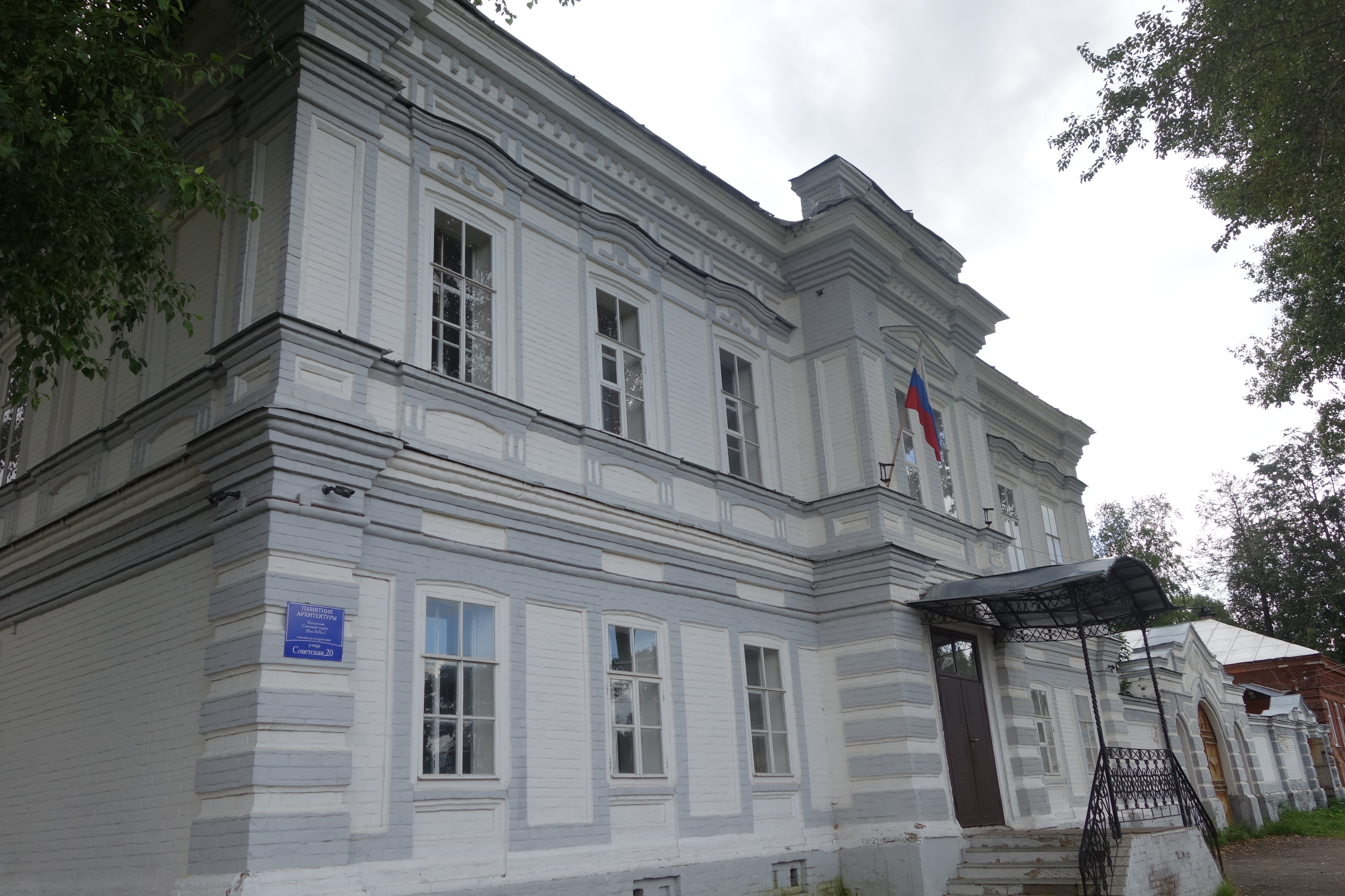 Богадельня: улица Советская, 20, Чердынский район, Пермский край